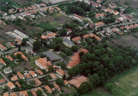 Mezőnyárád, Hungary, aerialphotography